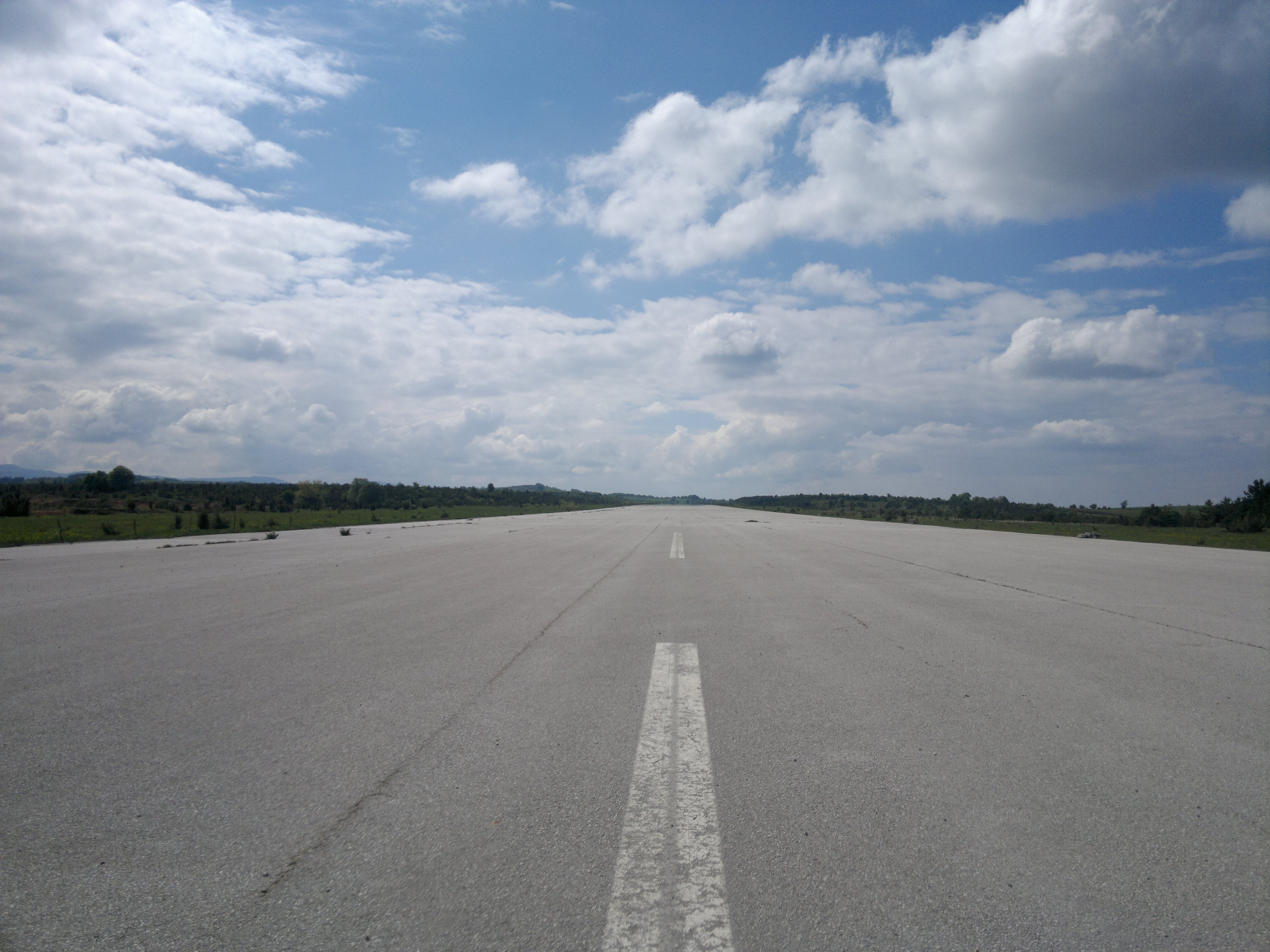 Pista